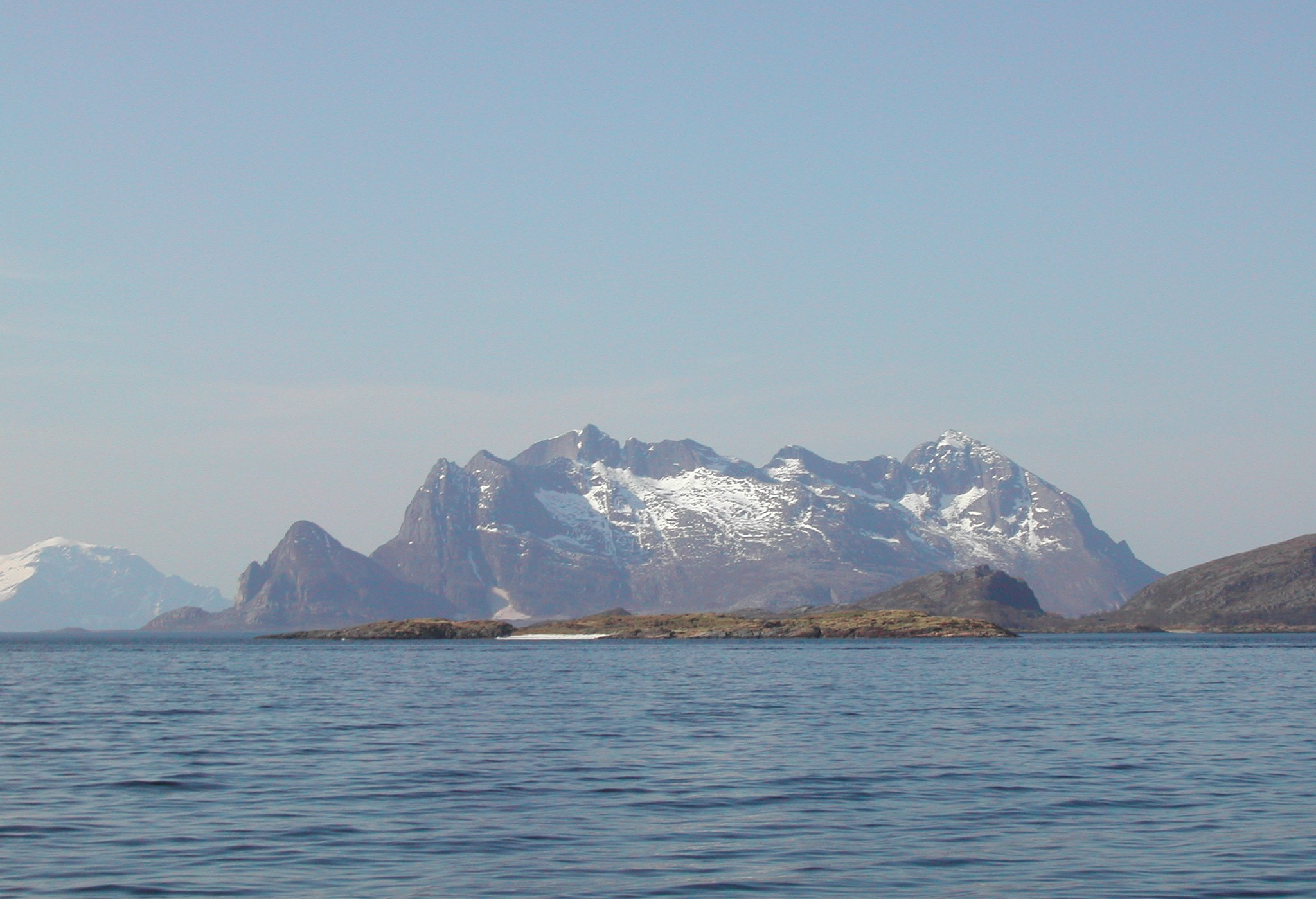 Fugløya photogr. from north